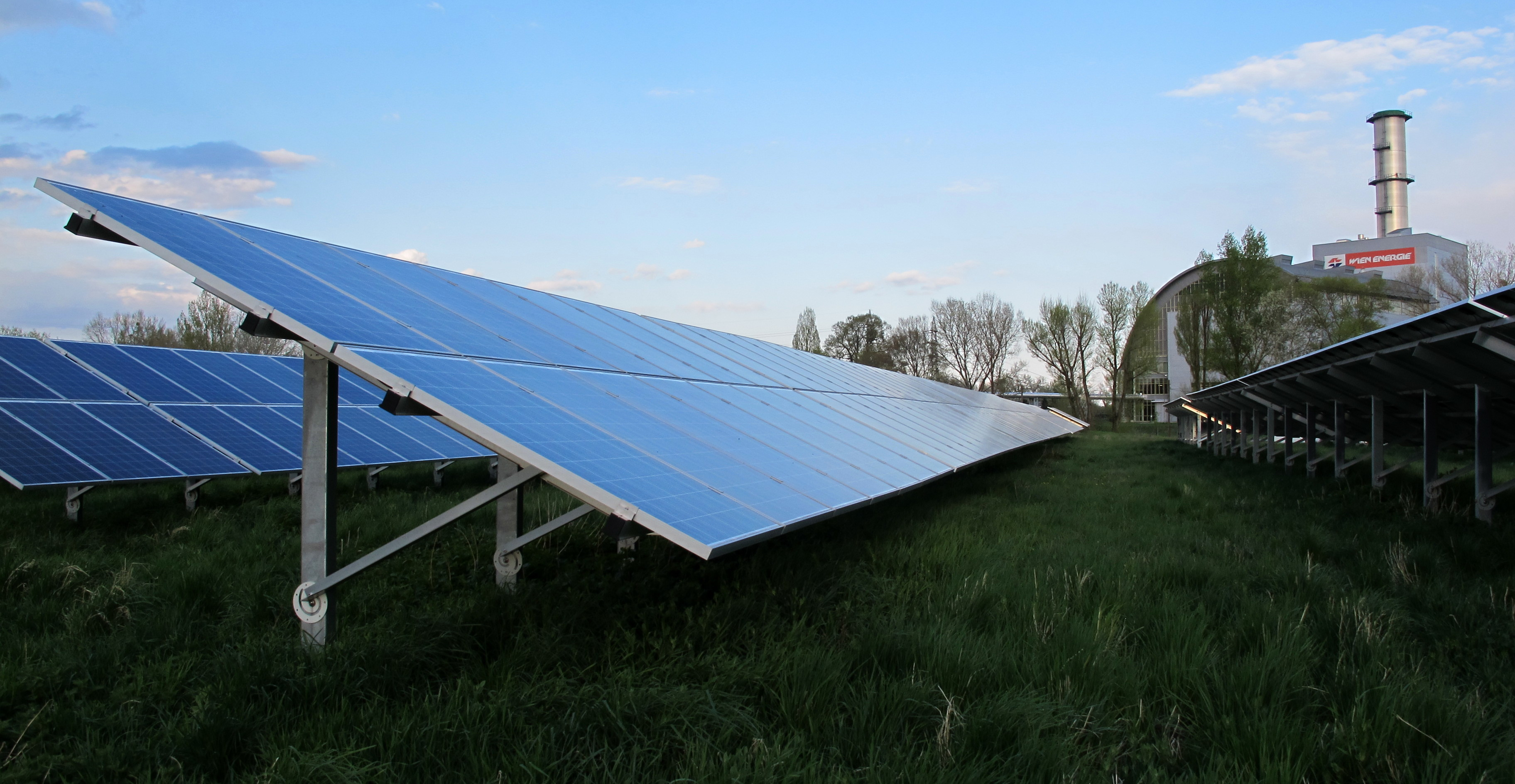 Kraftwerk Donaustadt, Teil der Photovoltaikanlage mit Paneele. Im Hintergrund Kraftwerksblock 3